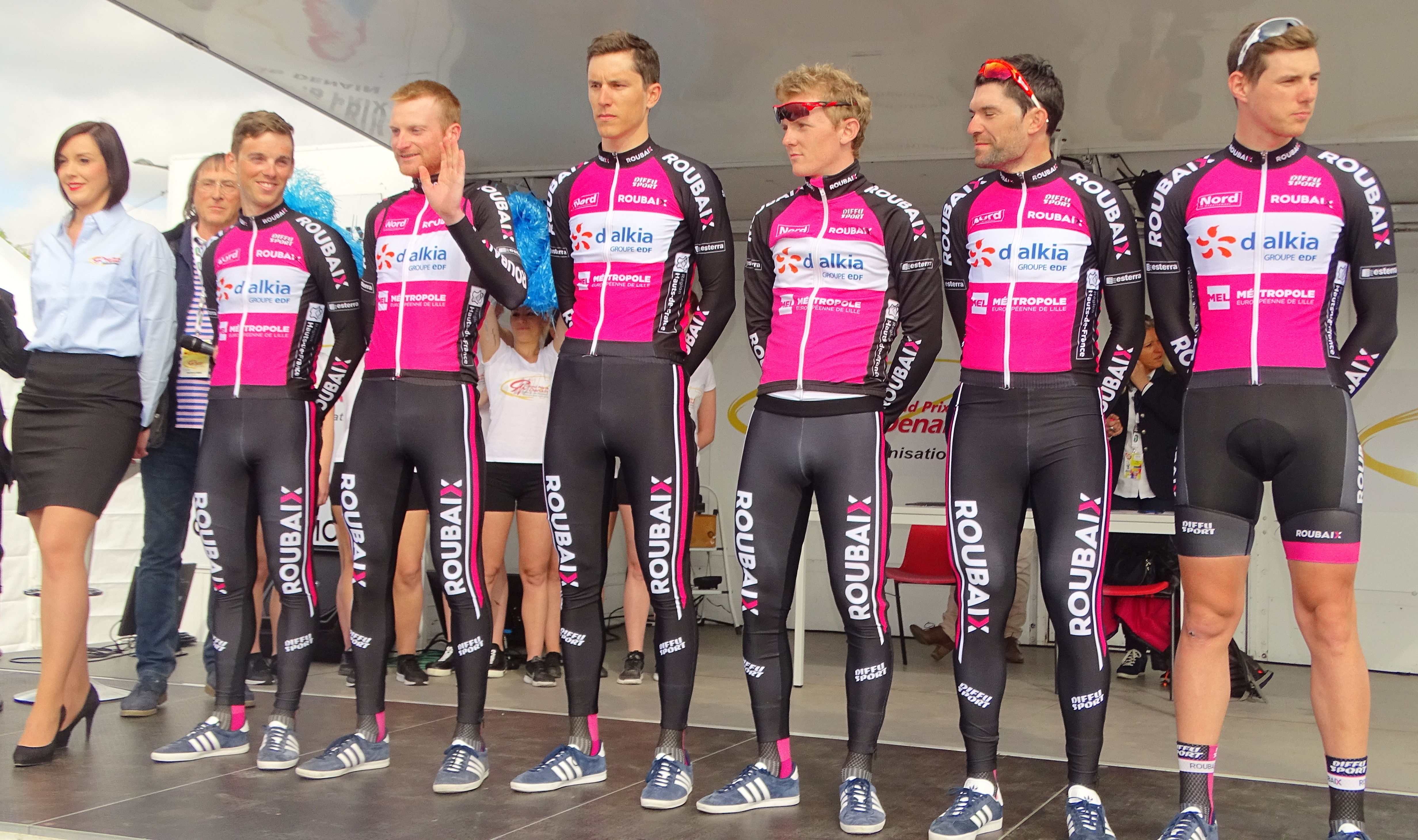 Reportage réalisé le jeudi 13 avril à l'occasion du départ et de l'arrivée du Grand Prix de Denain 2017 à Denain, Nord, Nord-Pas-de-Calais-Picardie, France.